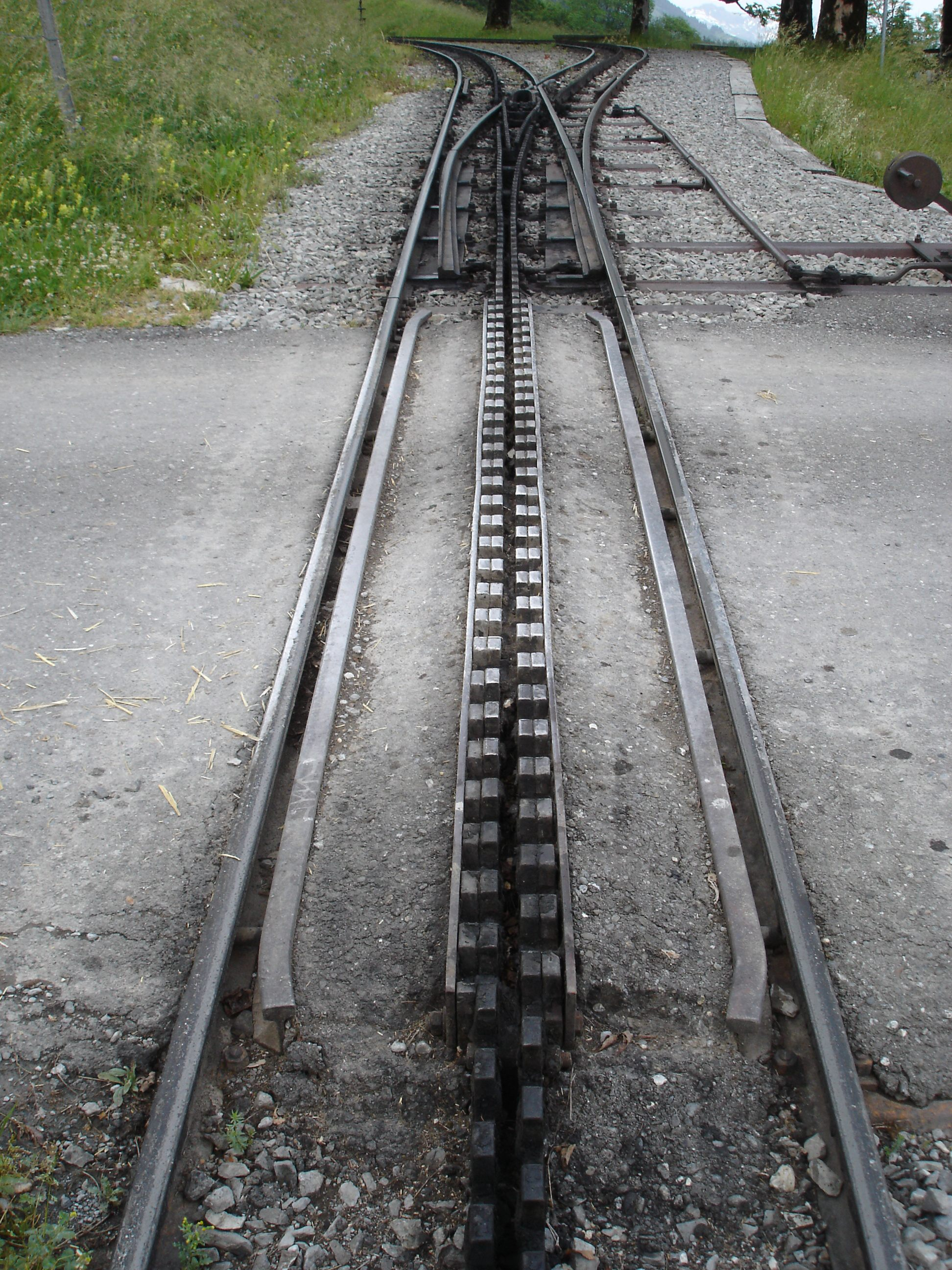 Bahnübergang bei Kreuzungsstelle Geldried der Brienz-Rothorn-Bahn